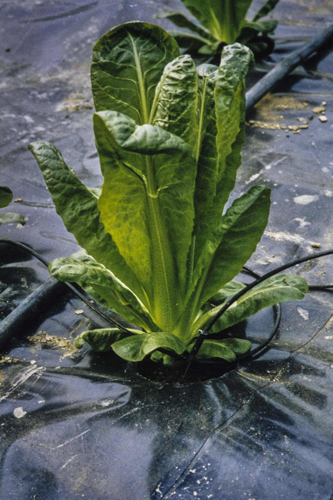 INRA, Jean Weber